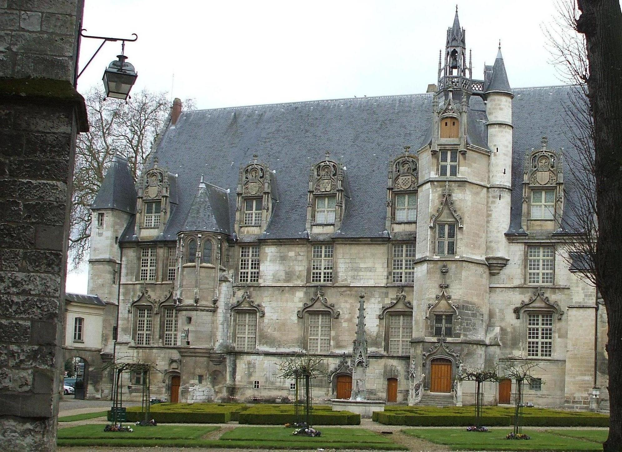 palais renaissance musé de beauvais oise france